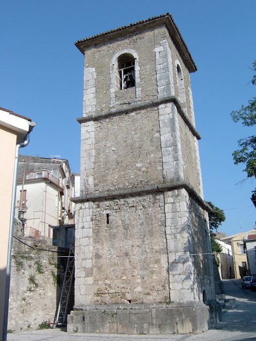 campanile chiesa S. Nicola v. di Ceppaloni